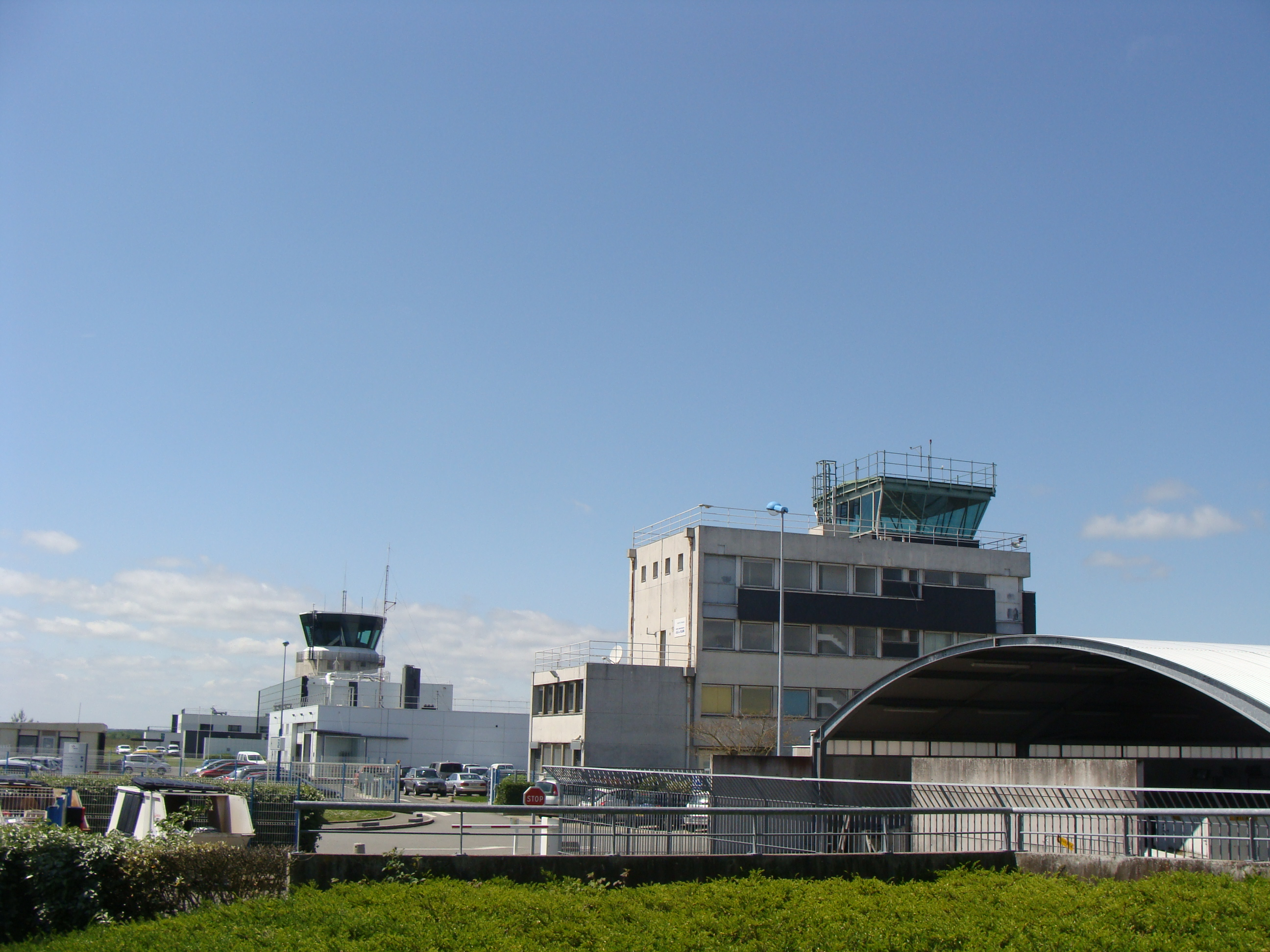 Aéroport de Rennes - Saint-Jacques - tours de contrôle